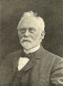 Eugen Warming